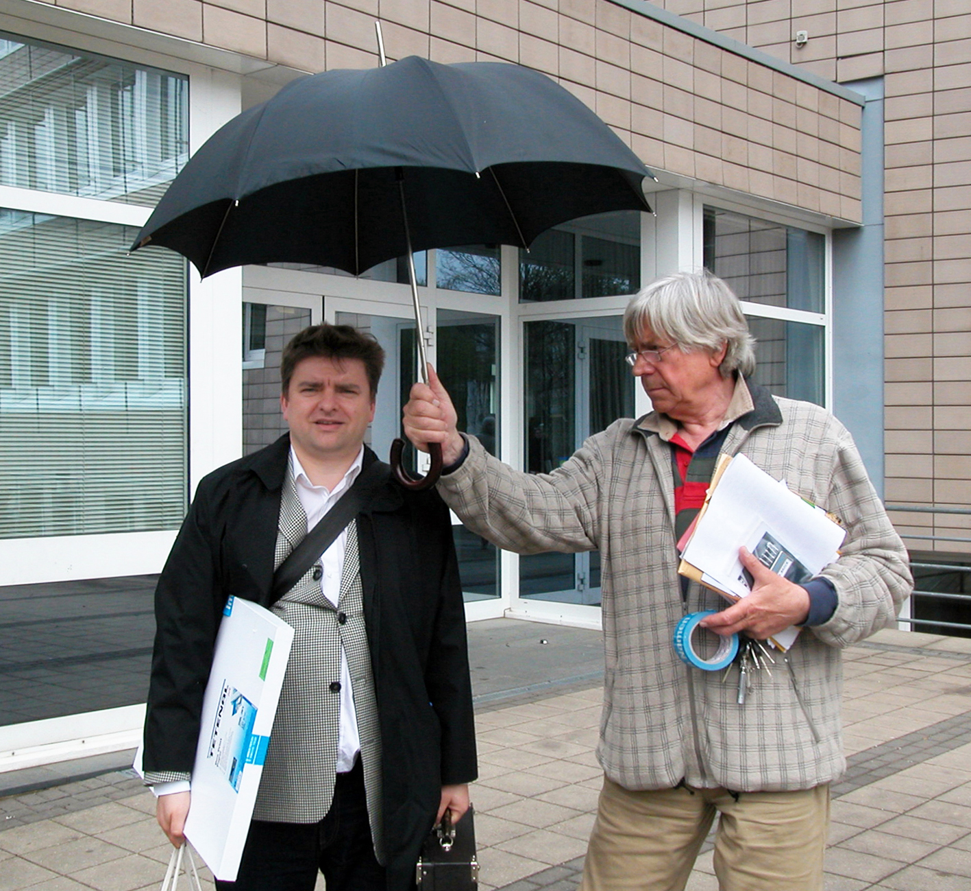 Andreas Paeslack und Bazon Brock 2004 als Schirmherr des Projektes »Im Namen der Kunst«